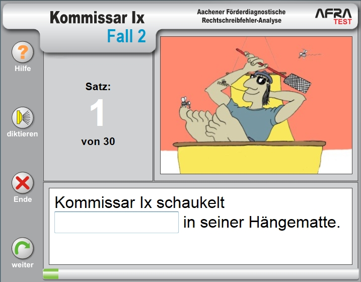 Screenshot der webbasierten Version des AFRA-Tests Kommissar Ix - Fall 2